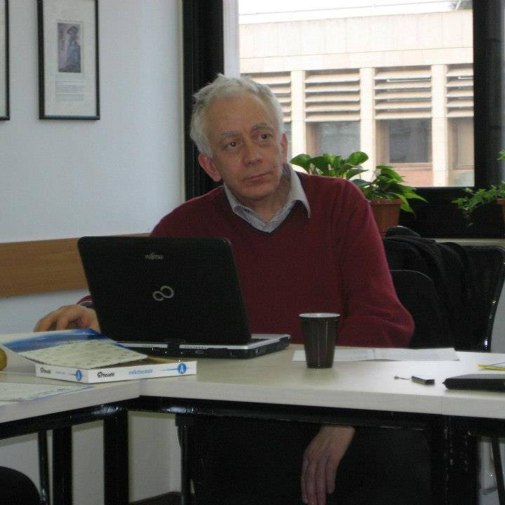 Giuseppe Veltri durante un seminario universitario